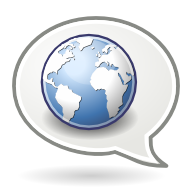 Logo du logiciel Gwibber